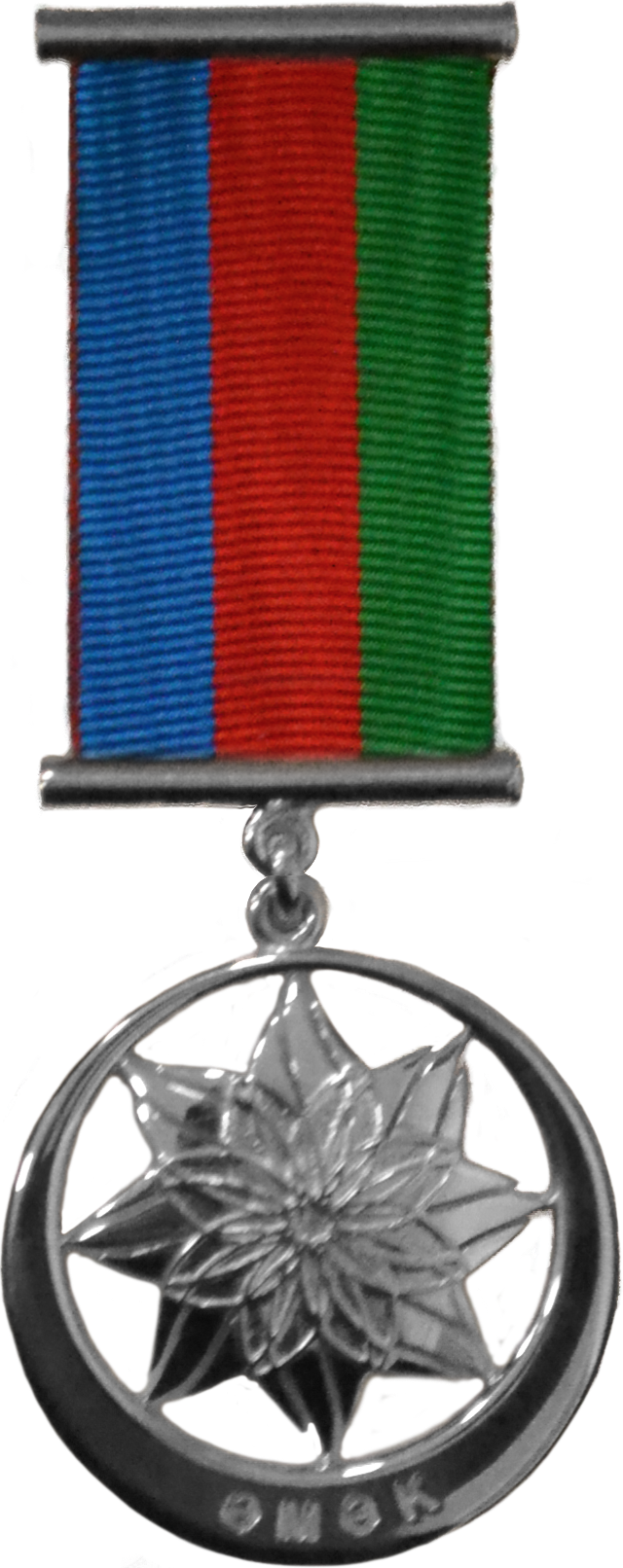 II dərəcəli "Əmək" ordeni